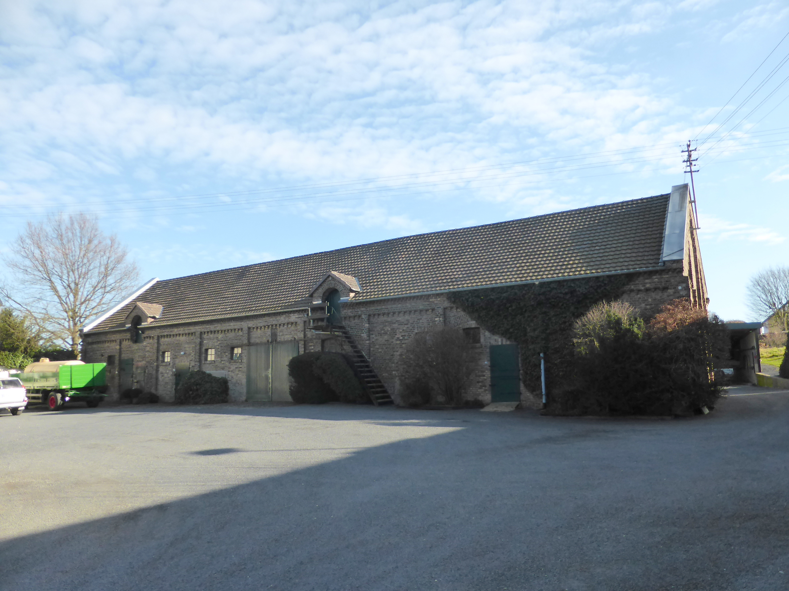 Burghof Oberholtdorf